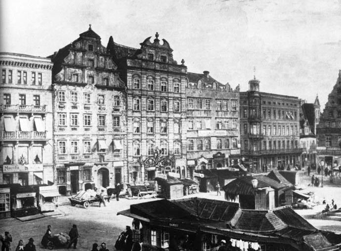 Rynek - strona wschodnia na tzw. stronie Zielonej Trzciny, w 1865 roku